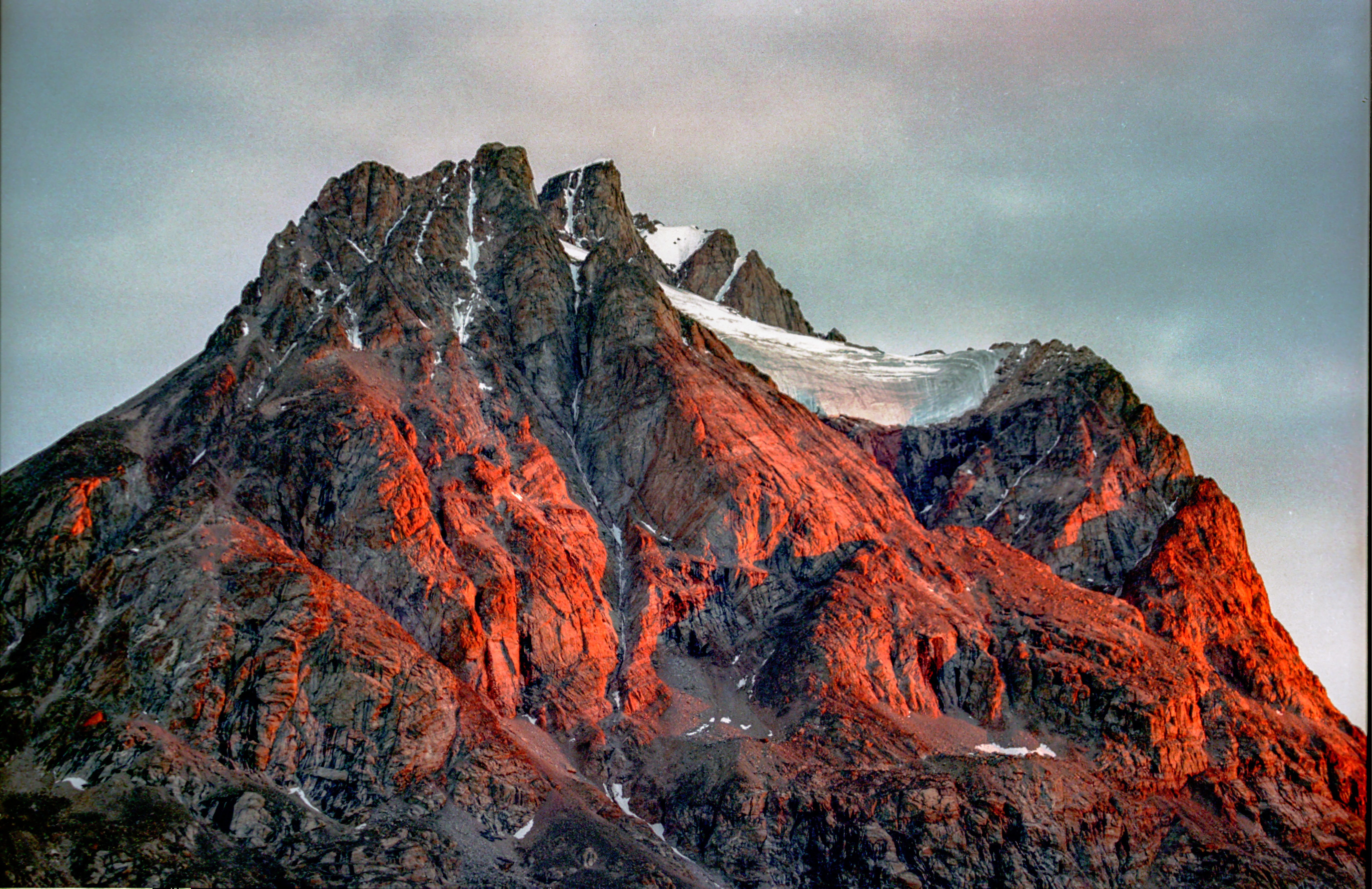 Góry wyspy Ymers